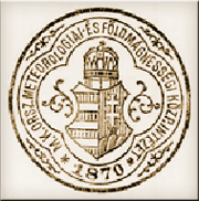 A Magyar Királyi Meteorológiai és Földdelejességi Intézet pecsétje 1870-ből, mely ma az Országos Meteorológiai Szolgálat néven működik.